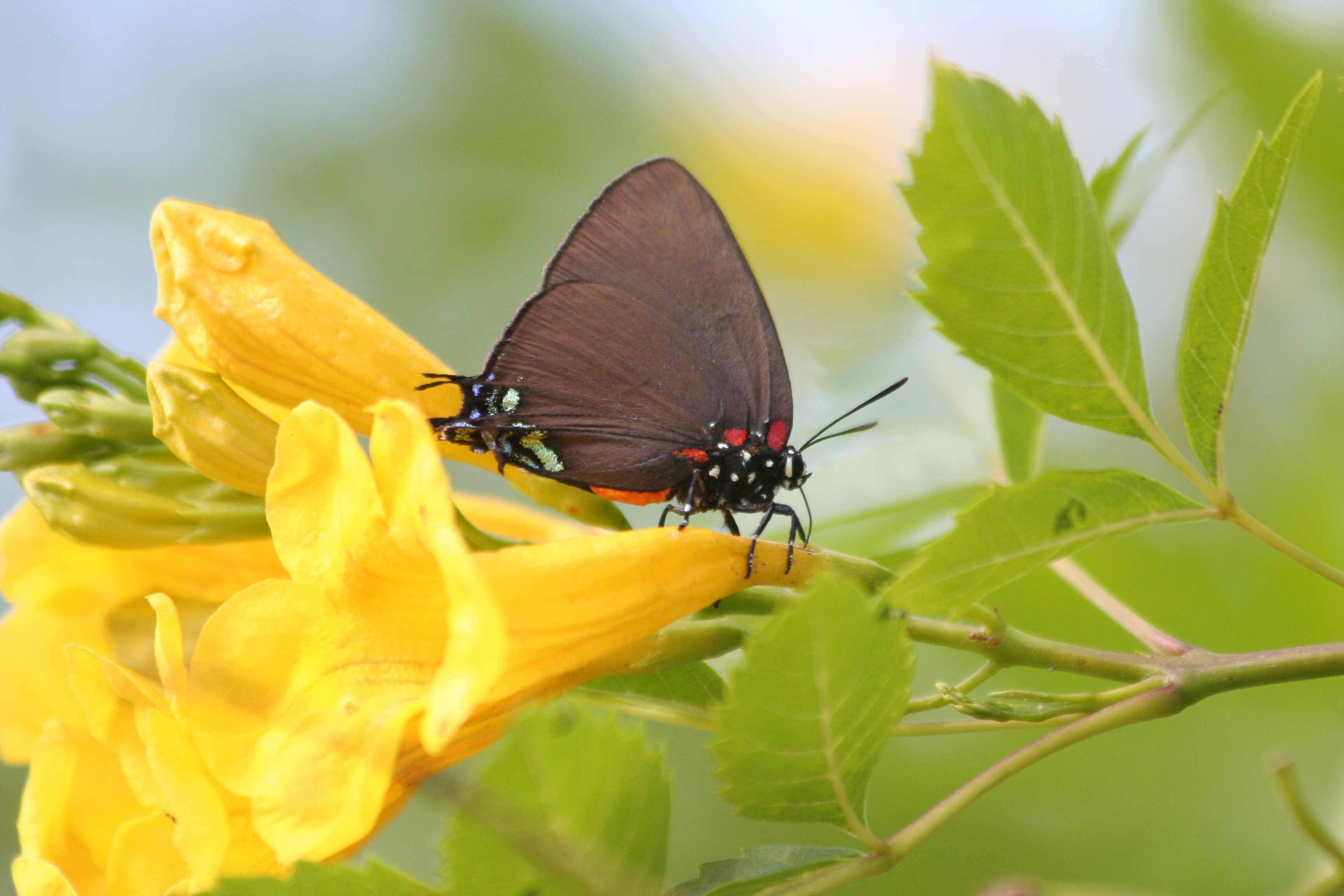 Atlides halesus ♀, Rio Grande Valley, Texas, USA